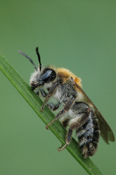 Andrena barbilabris from Commanster, Belgian High Ardennes .